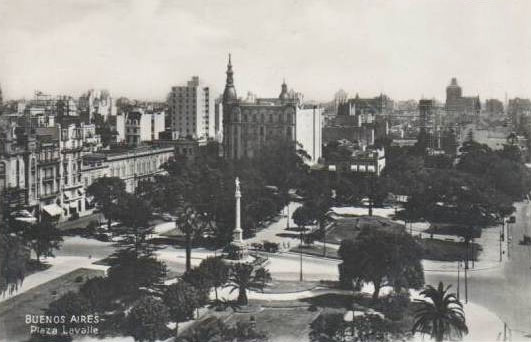 Vista hacia el norte de Plaza Lavalle en Buenos Aires. Se observa el Monumento a Juan Lavalle, la calle Tucumán, y la manzana donde se encontraba el Palacio Miró y un edificio con cúpula, demolida en 1937 para ampliar la plaza.